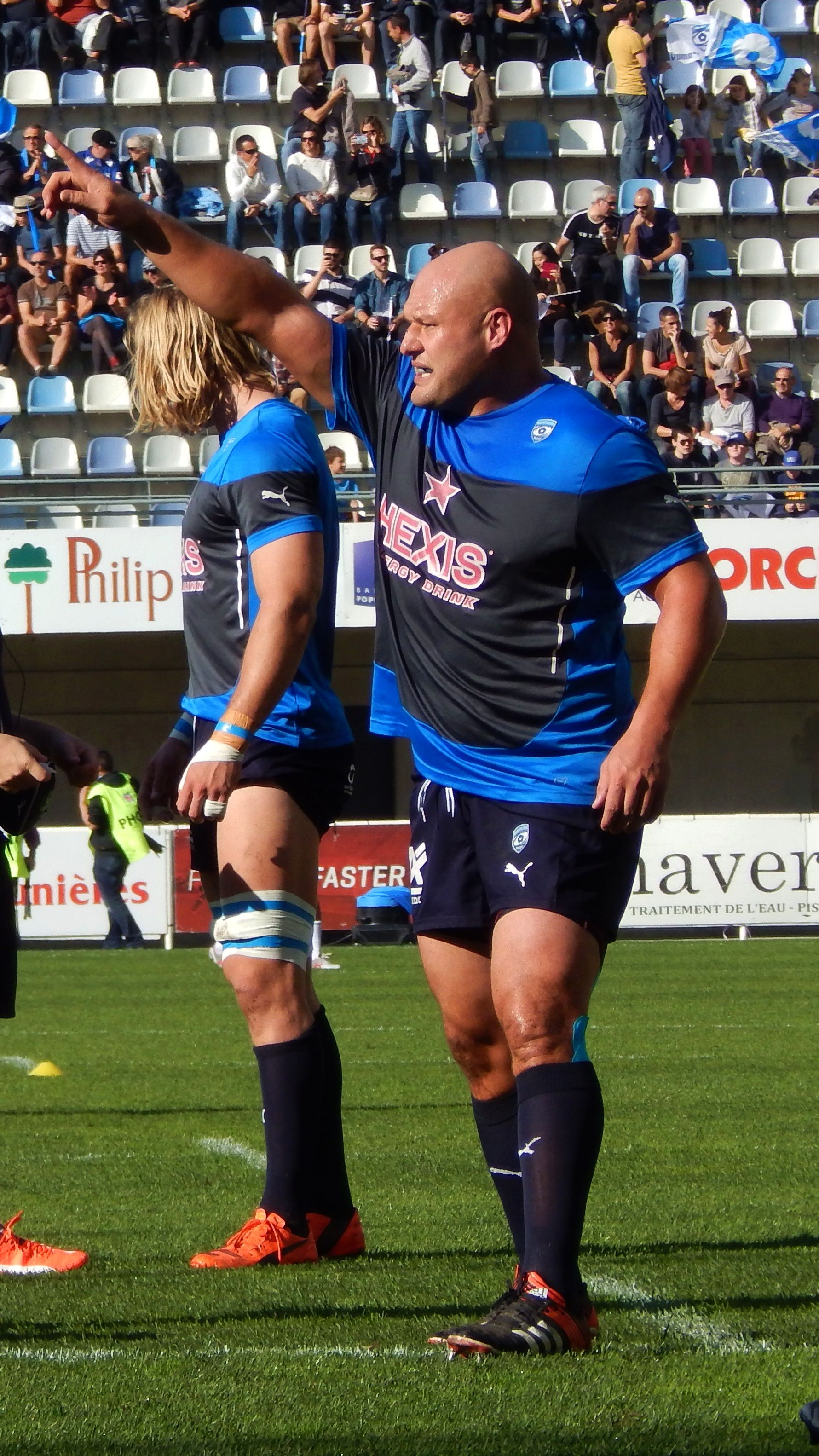 CJ van der Linde (MHR), octobre 2015